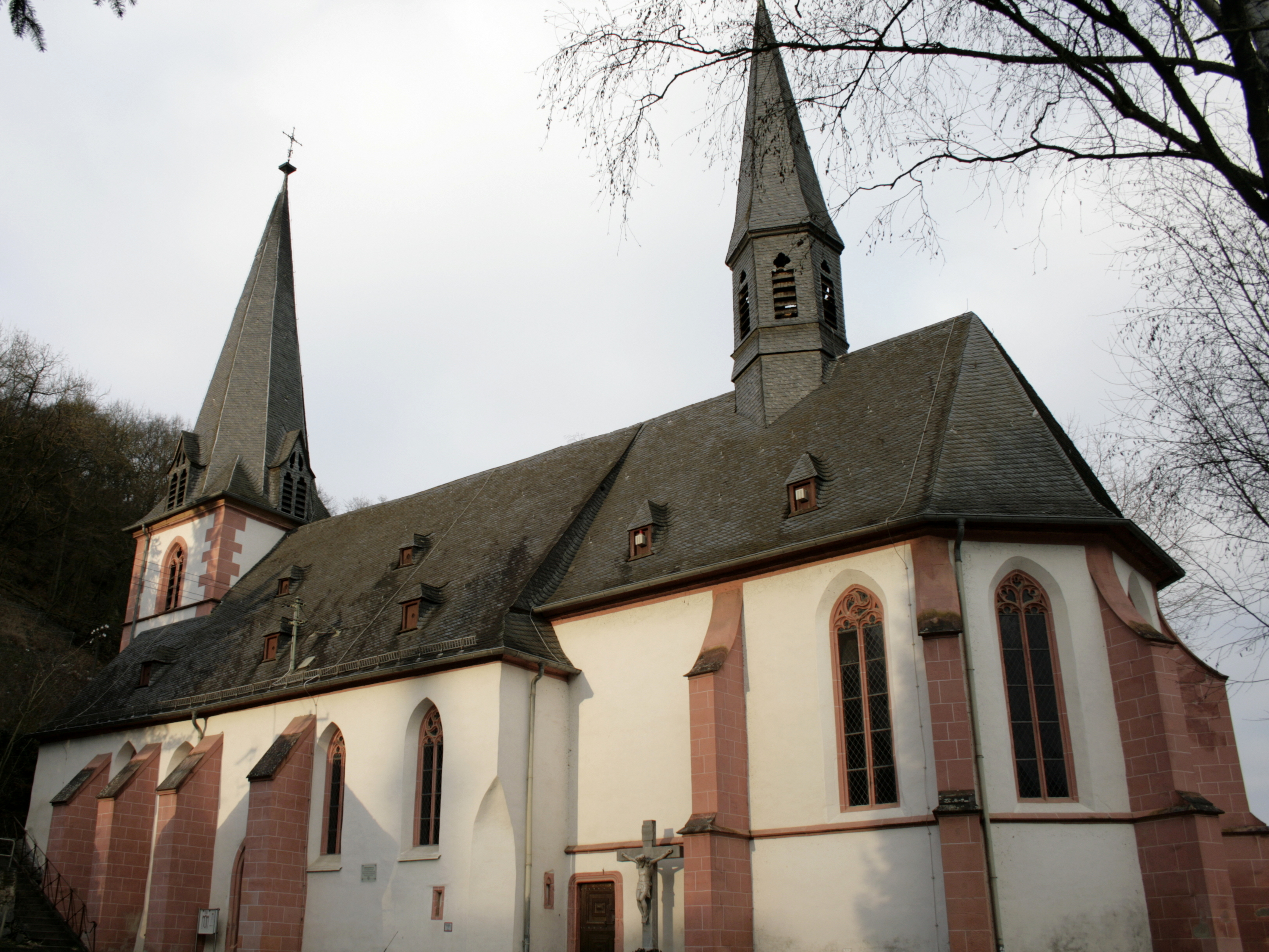 Portalseite (Südwestseite) der Liebfrauenkirche in Hadamar, Deutschland